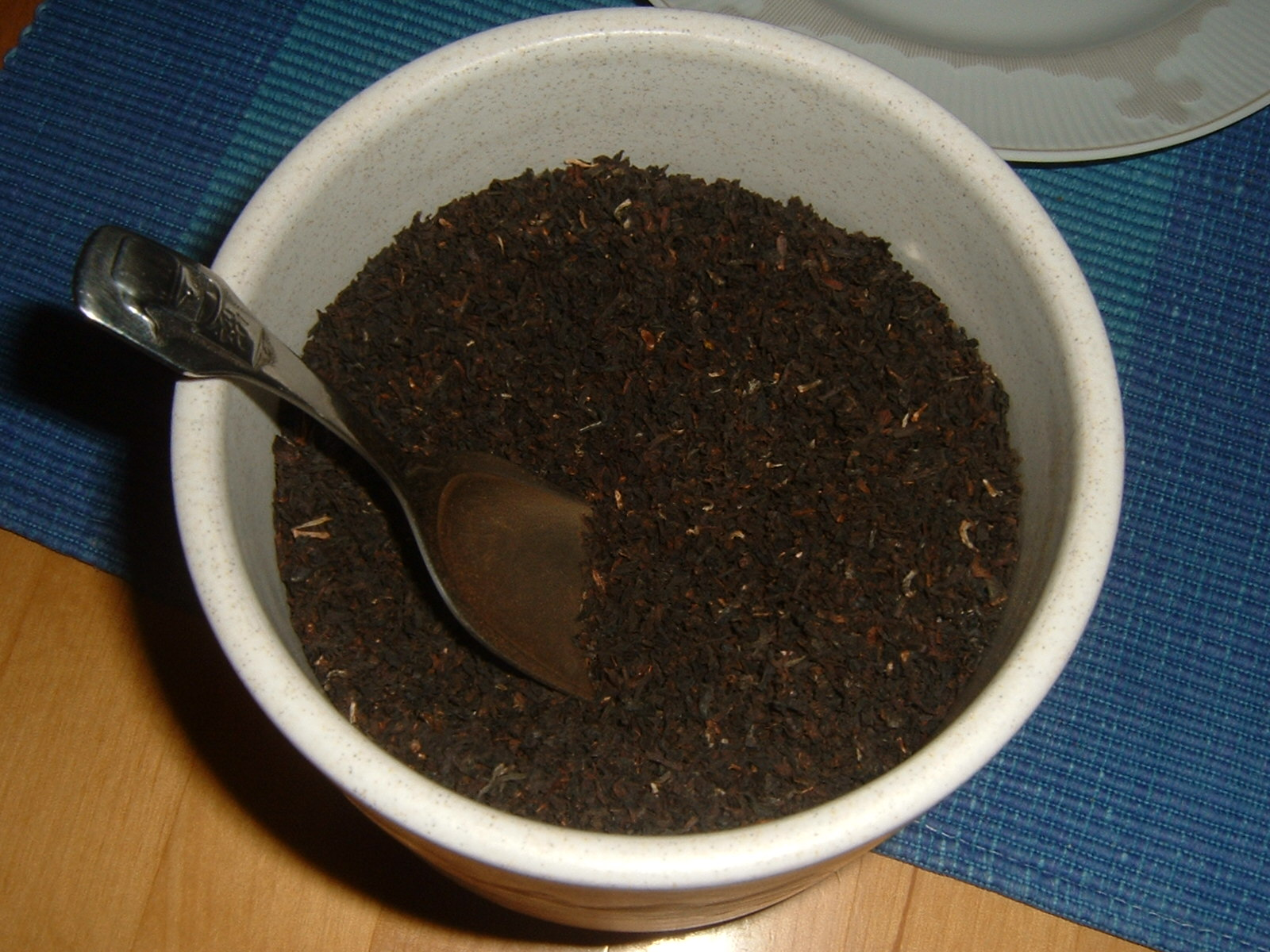 Ostfriesische Teemischung